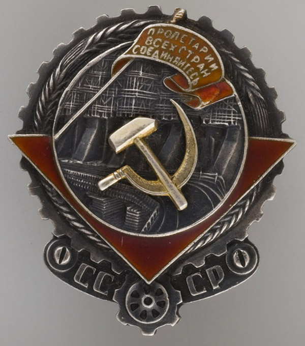 Орден Трудового Красного Знамени. Первый тип